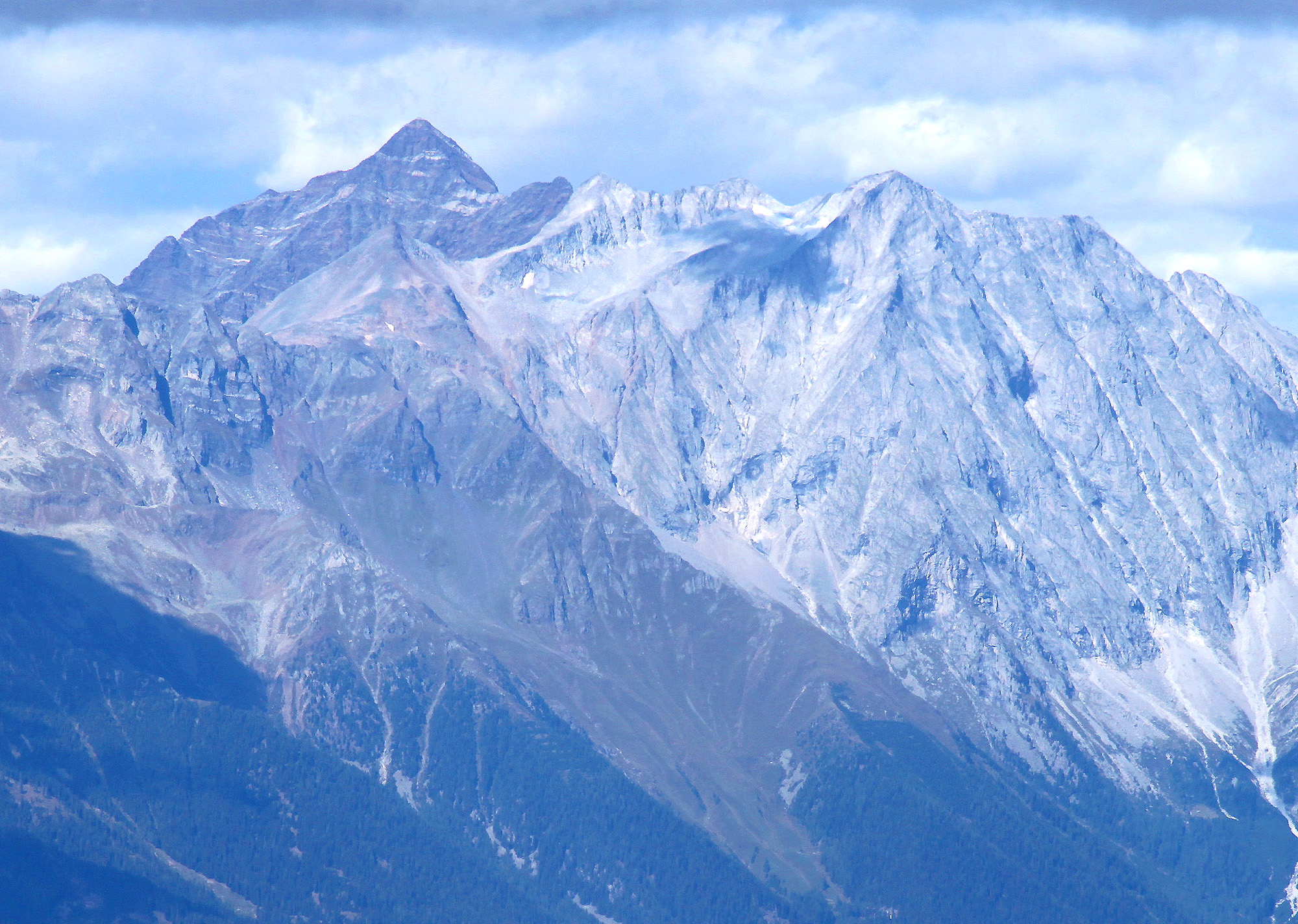 Schneebiger Nock und Magerstein, Zoomaufnahme von Süden (Pragser Wildkofel)